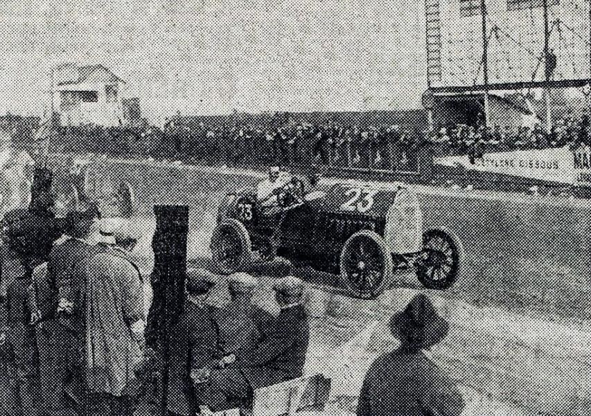 Louis Wagner devant les stands, Grand Prix de l'ACF 1912.